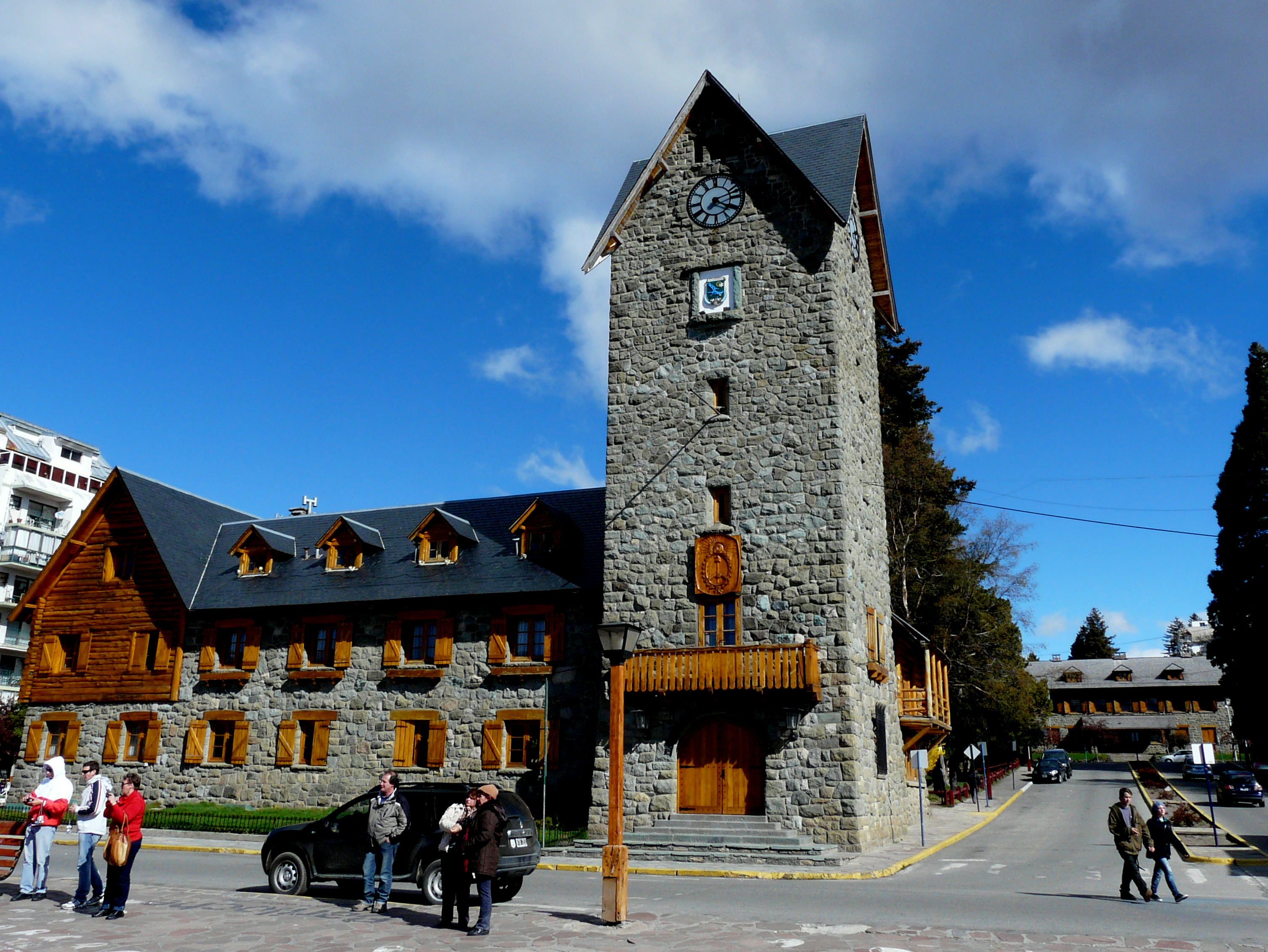 Centro Cívico y la Intendencia de Parques Nacionales al final de la calle.